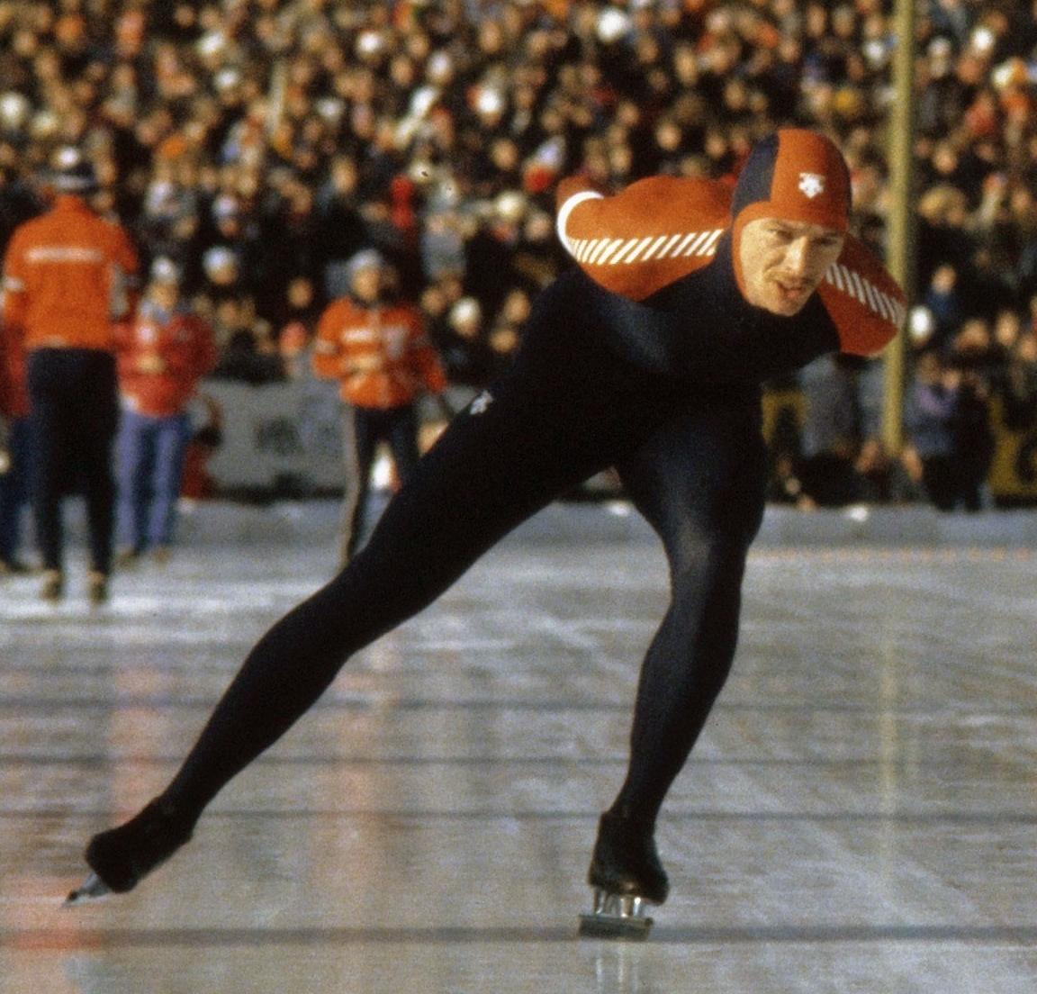 Uitsnede van